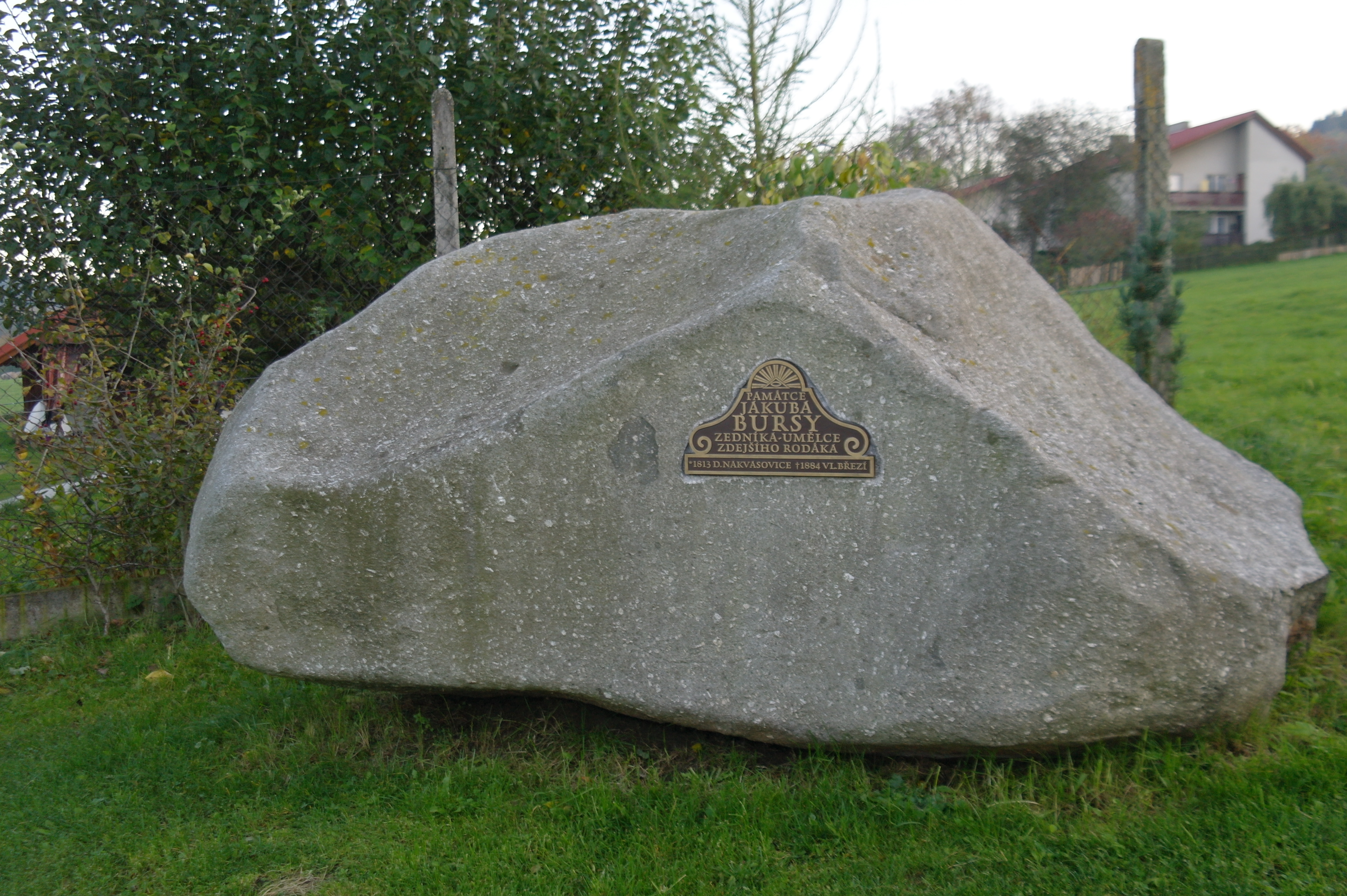 Pamětní kámen Jakuba Bursy, vesnice Dolní Nakvasovice, součást obce Bušanovice.